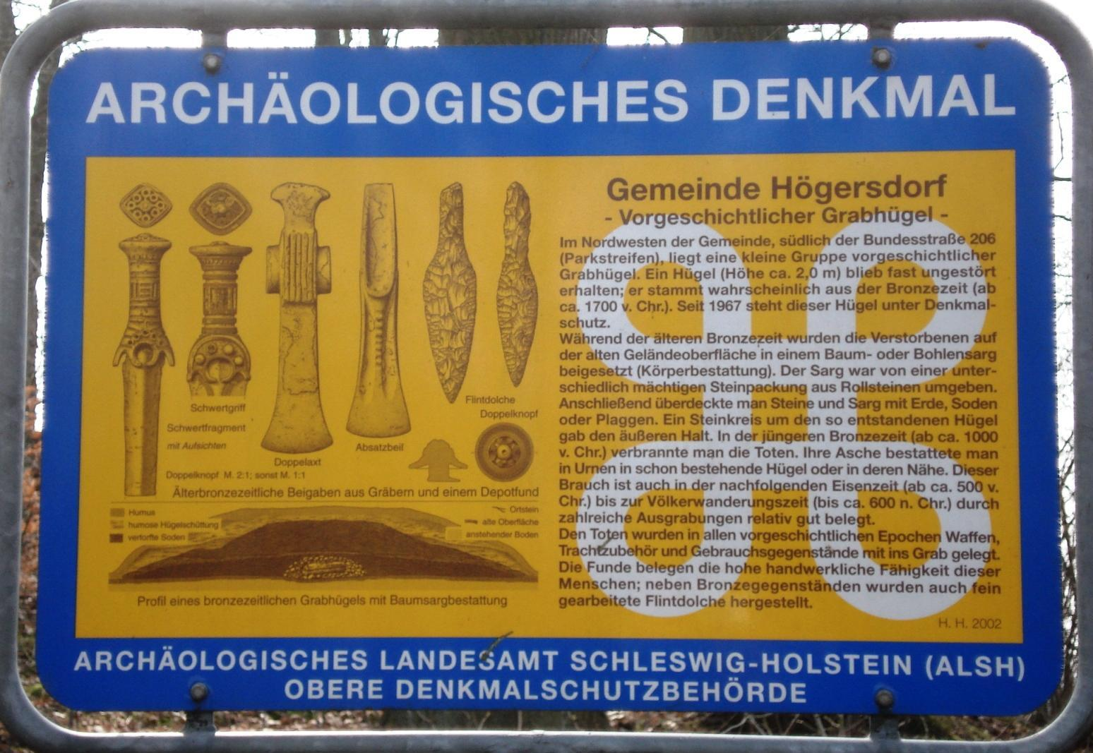 Grabhuegel Hoegersdorf-Rotenhahn - Schild